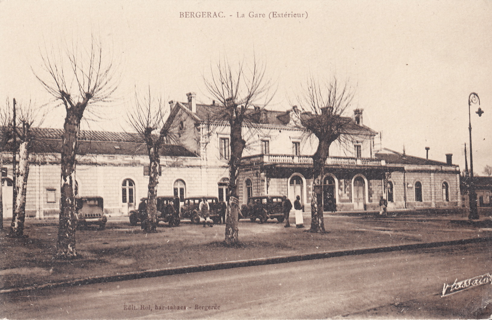 Carte postale ancienne éditée par Rol à Bergerac : BERGERAC - La Gare